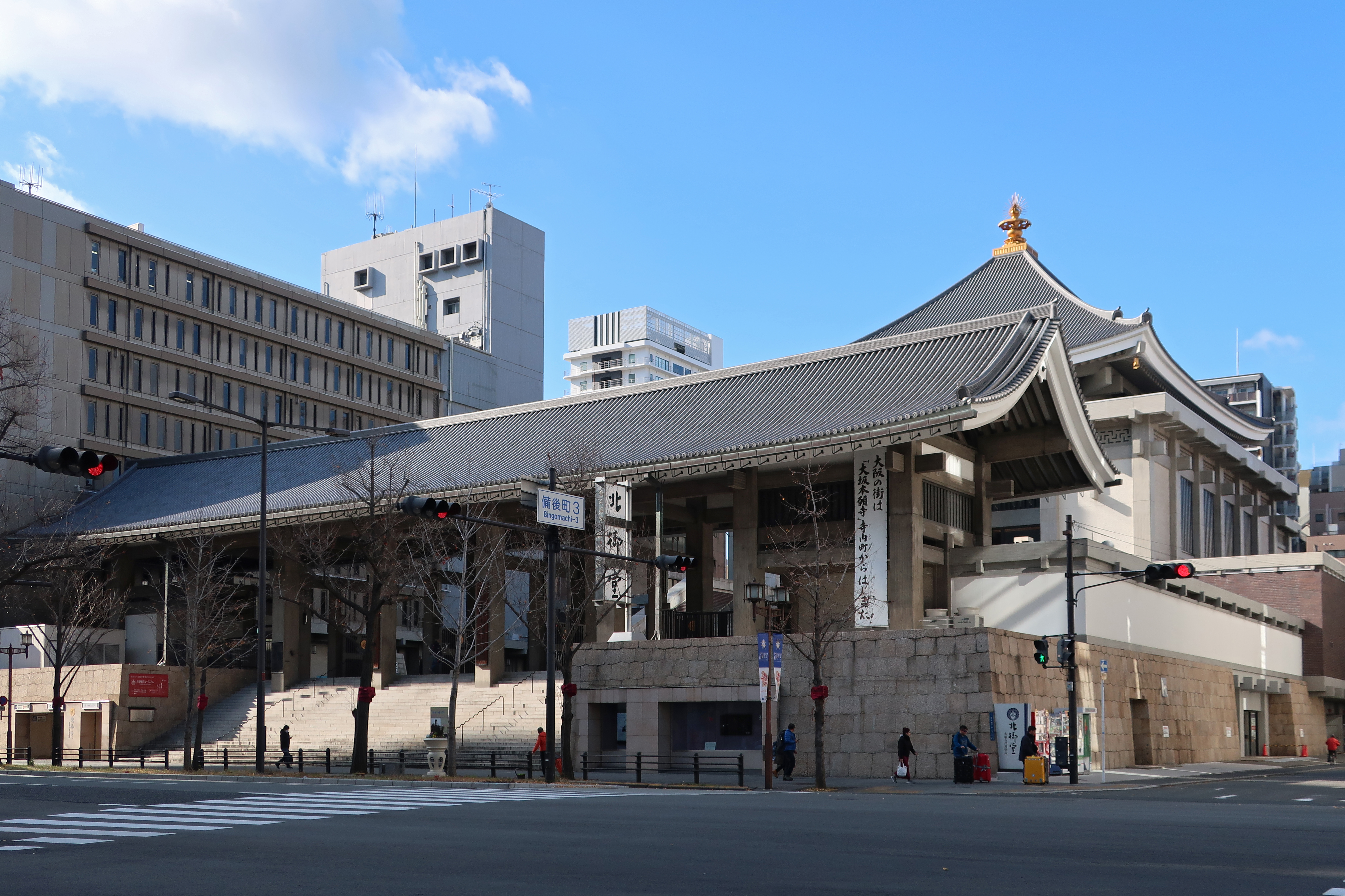 Hongan-ji Tsumura Betsuin (本願寺津村別院) at Osaka City, Japan. Canon PowerShot G9 X Mark II